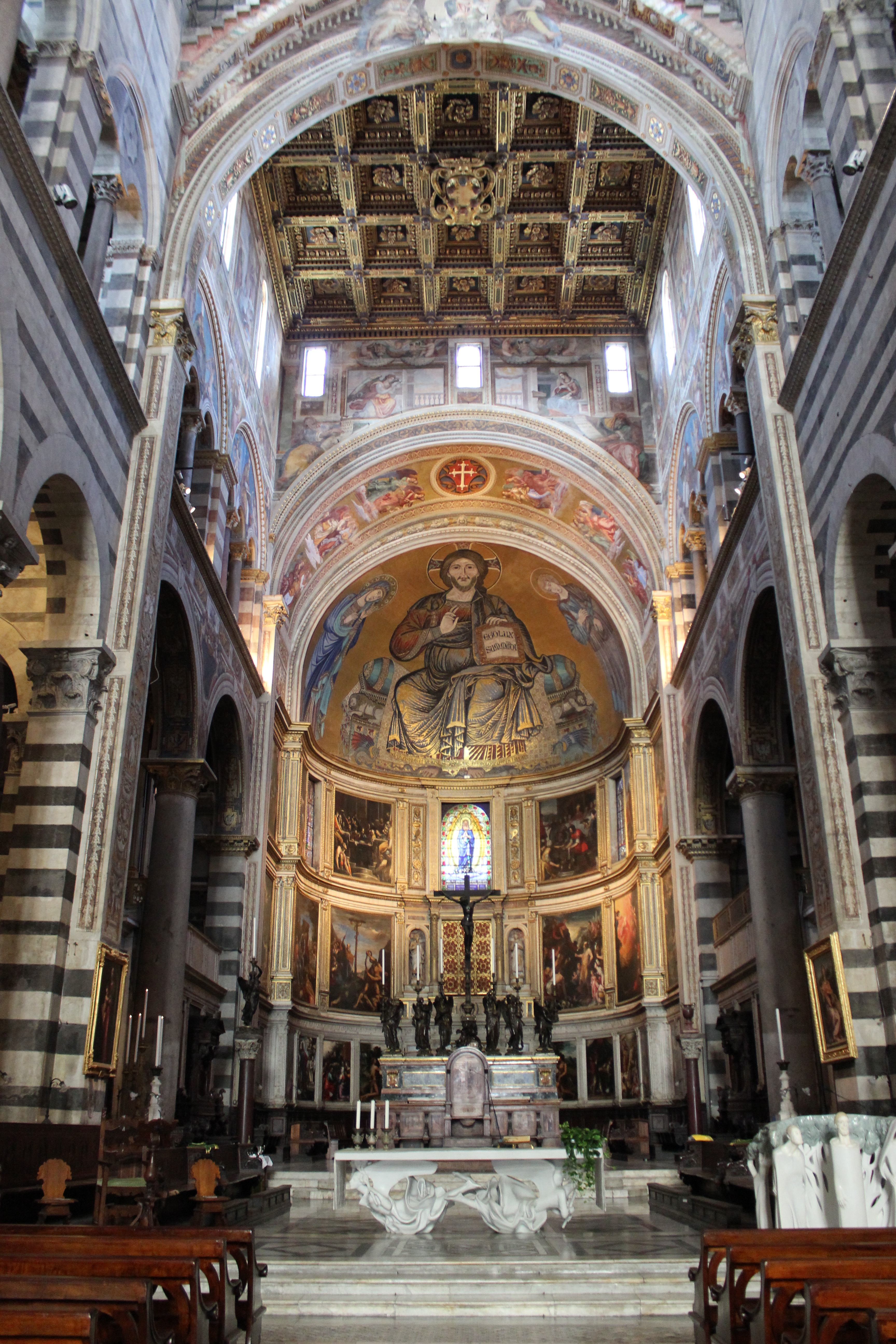 Altar mayor de la Catedral de Pisa